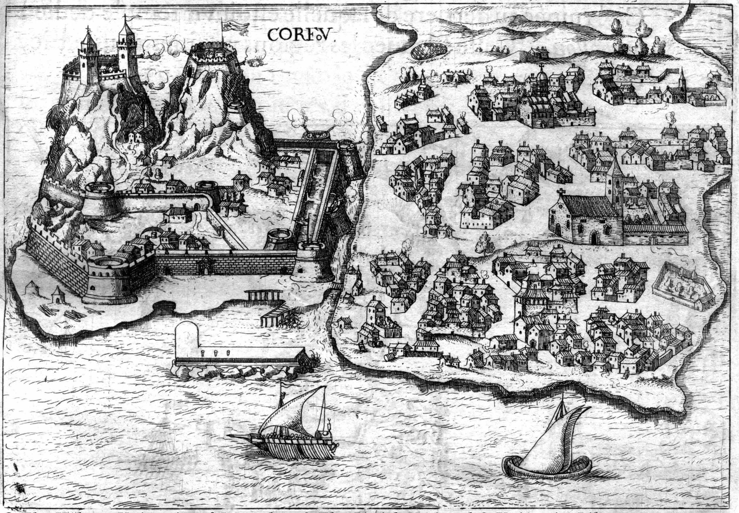 Παλιά πόλη Κέρκυρας και το παλιό φρούριο